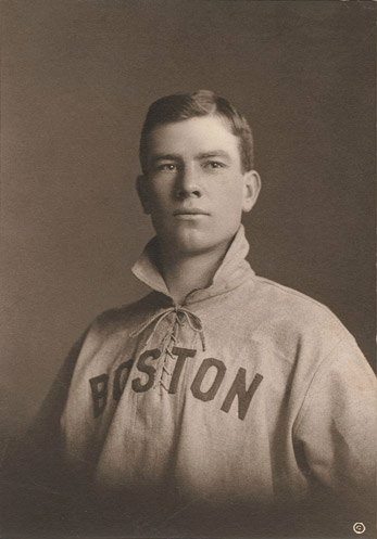 Tris Speaker